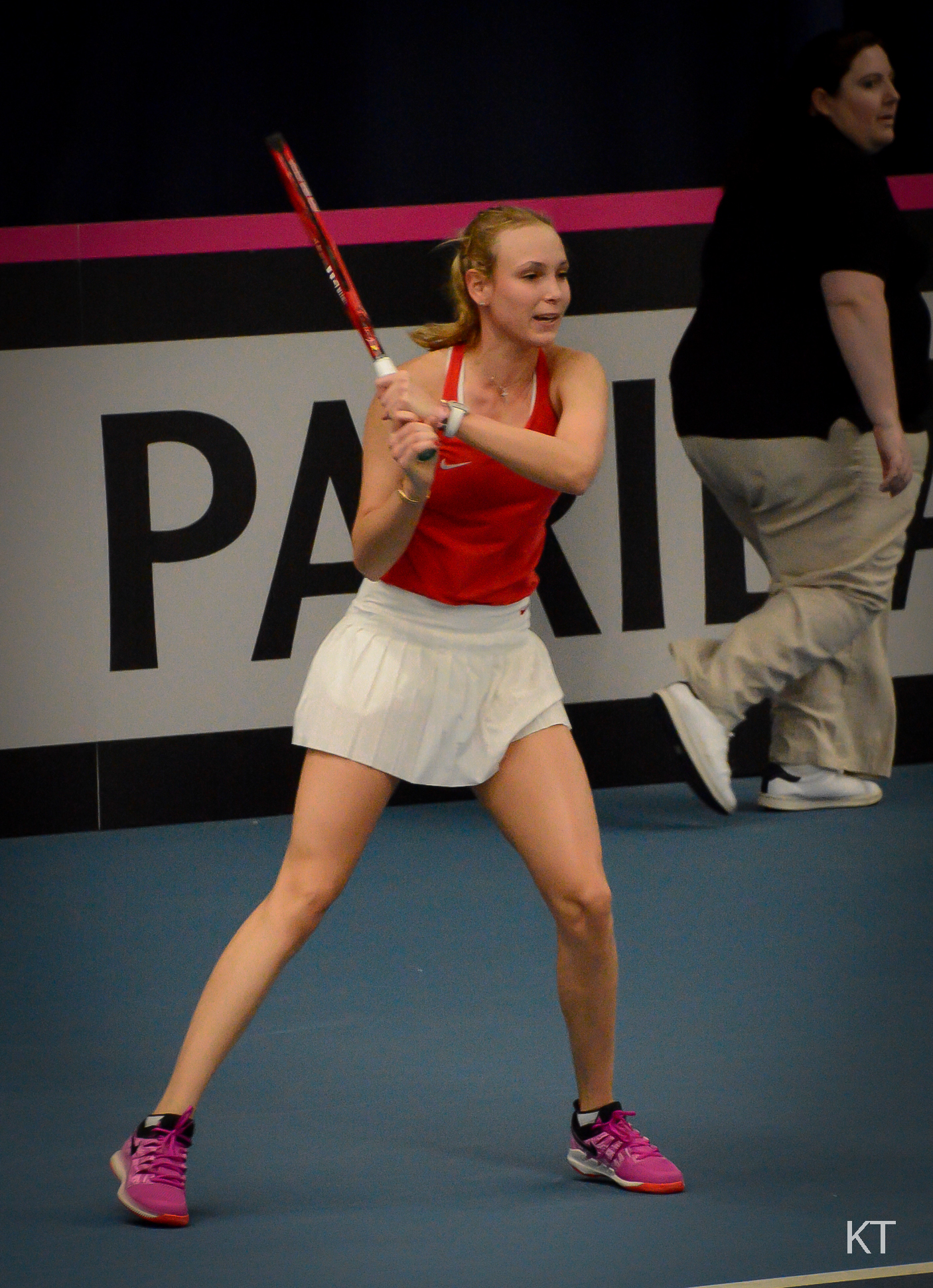 Donna Vekic